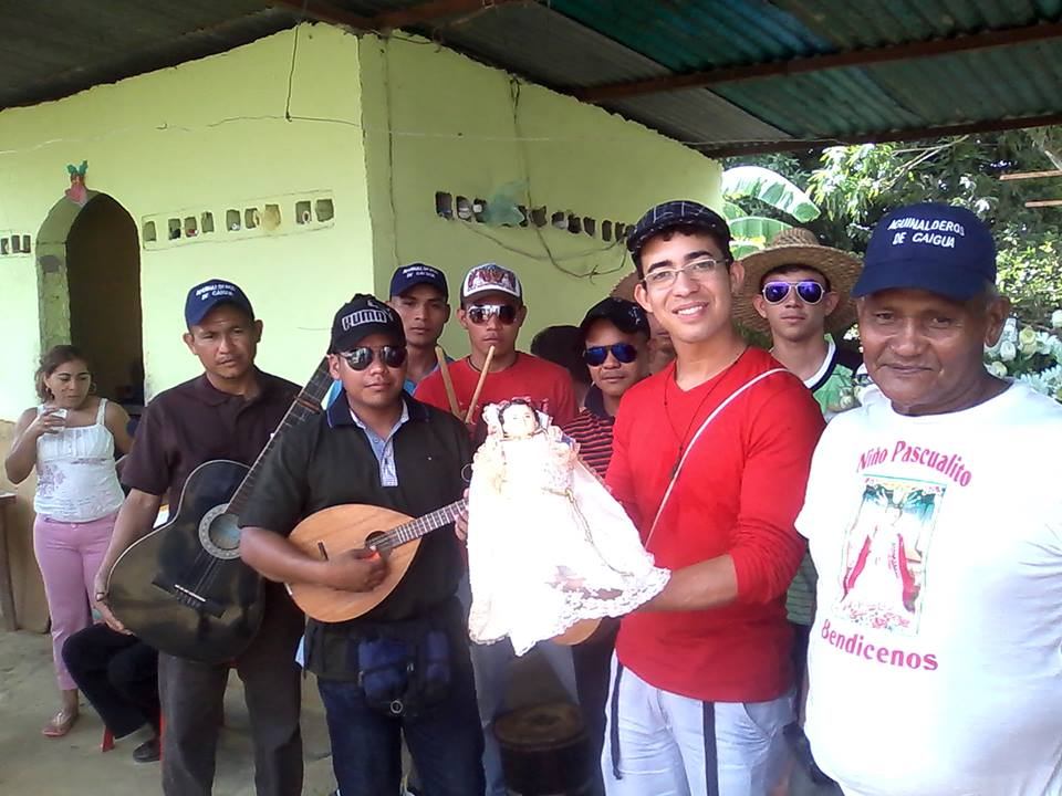 A la izquierda de la Fotografia,el Sr.Gilberto Yaguaran, Custodio del Niño Jesus de Caiguapatar